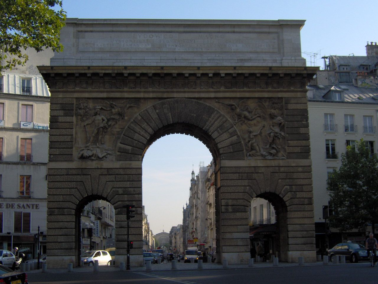 Pierre Bullet: Porte Saint-Martin (1674), Paris, vue du nord, avec reliefs allégoriques La Défaite des Allemands par Gaspard Marsy (à gauche) et La Prise de Limbourg en 1675 par Pierre Le Gros l'aîné (à droite). .